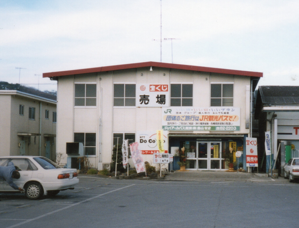 烏山支店当時